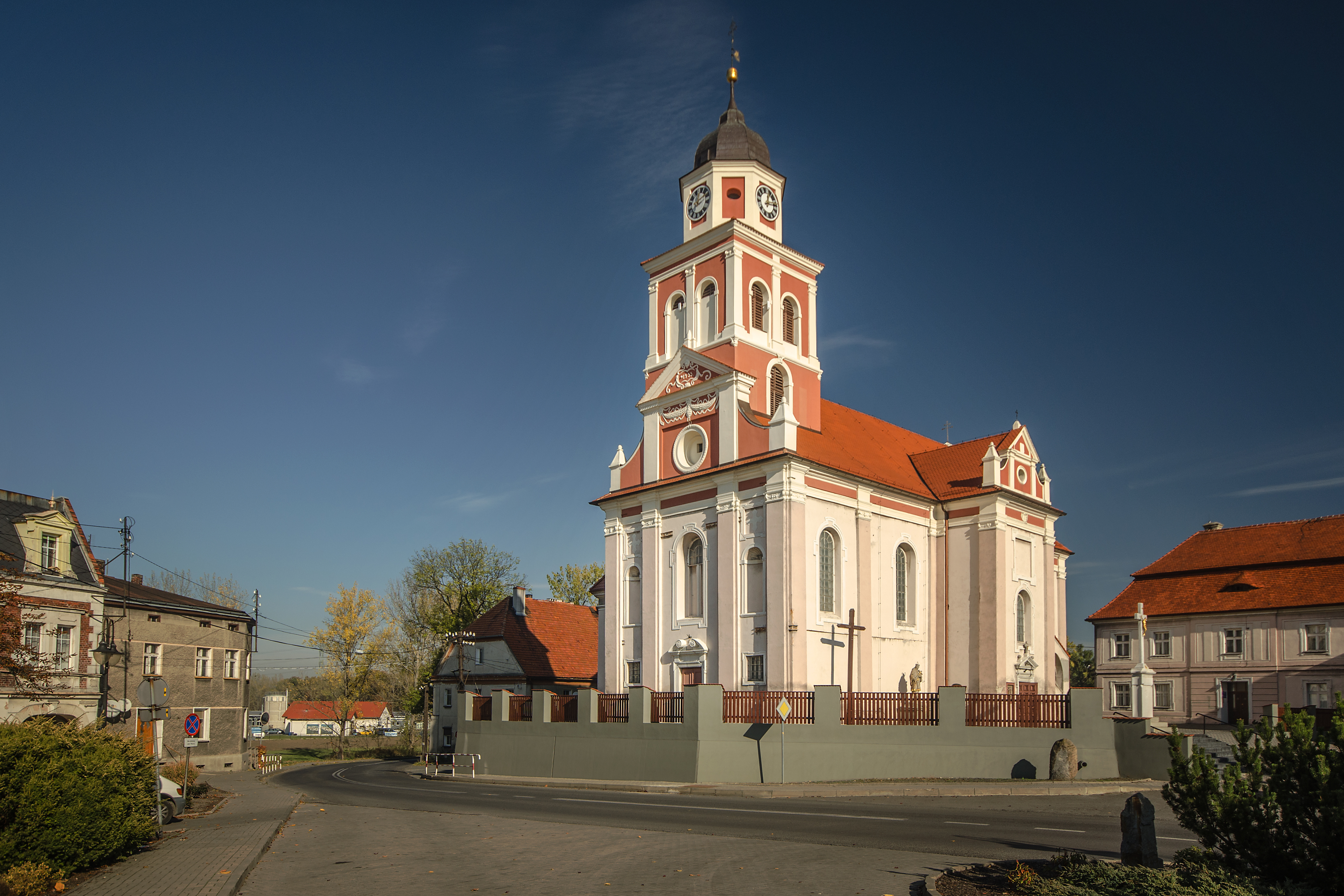 Prószków, kościół par. p.w. św. Jerzego, 1687, XIX